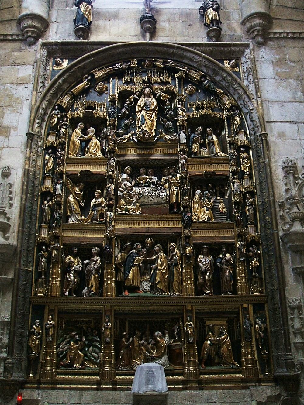 Retablo de la Capilla de la Natividad, Iglesia de San Gil Abad, Burgos